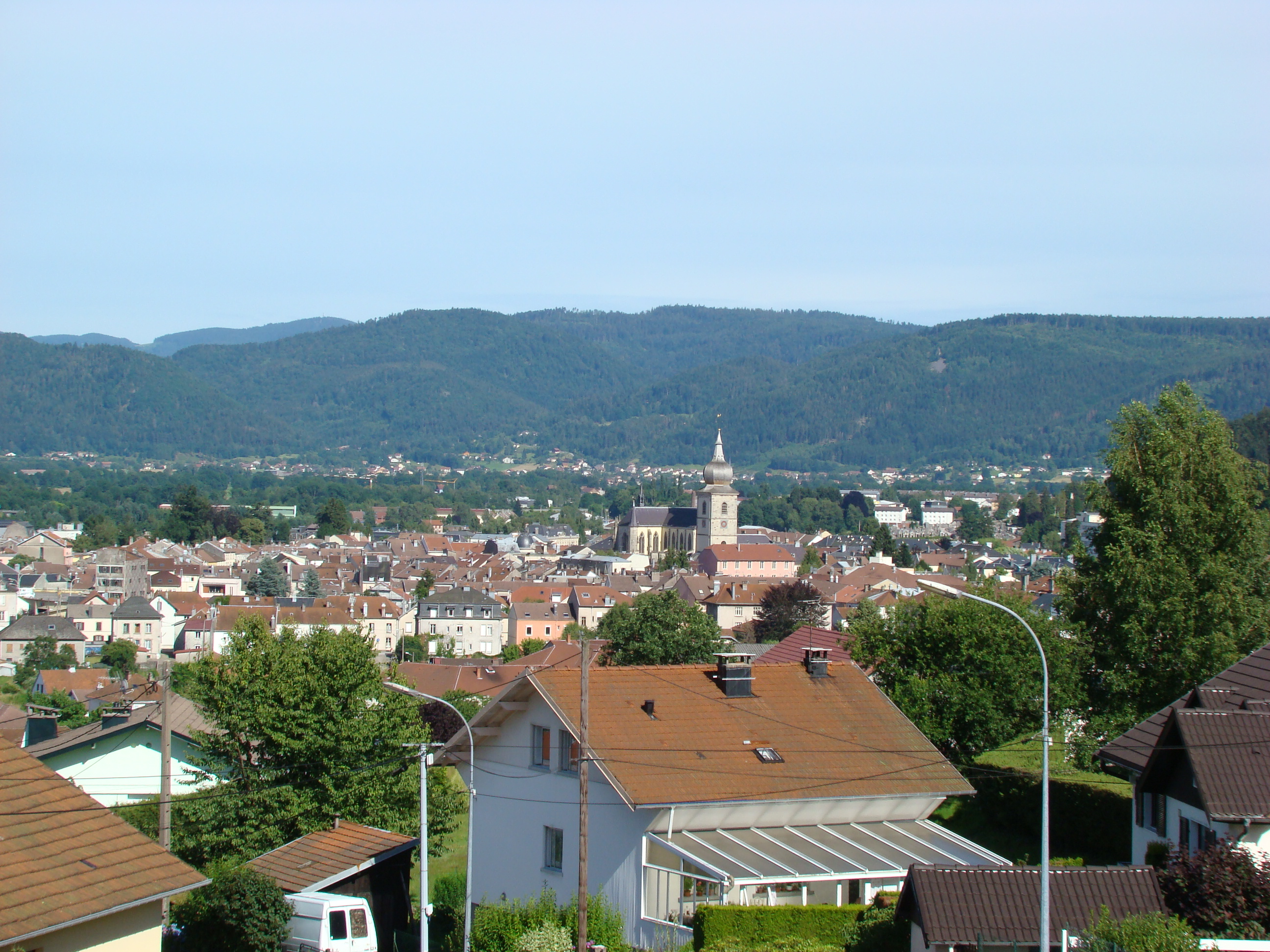 Centre ville de Remiremont depuis la butte de la rue du Champ de Tir